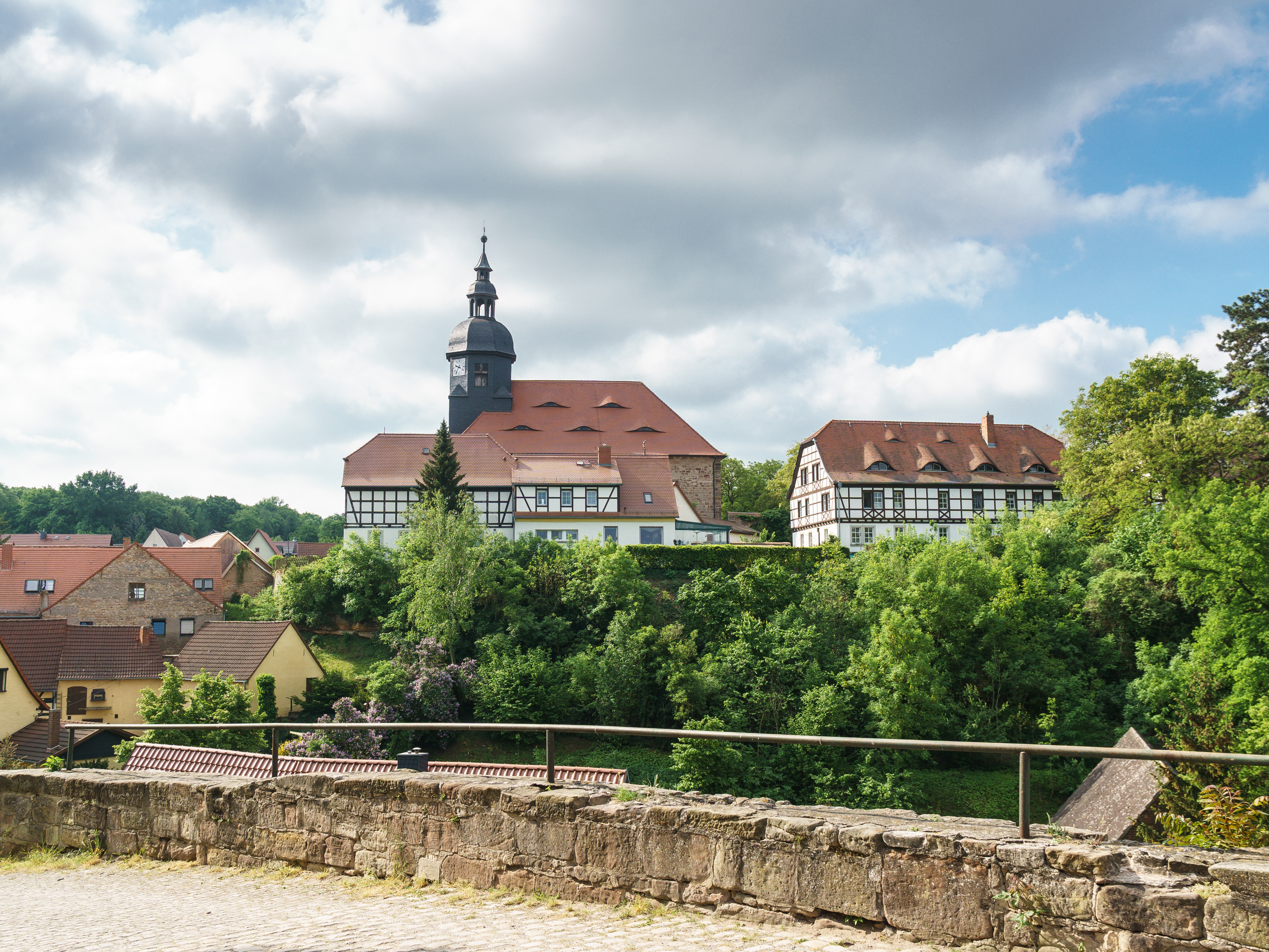 Kirche und Pfarrhaus Dorfstraße in Schönburg This is a picture of the Baudenkmal (cultural heritage monument) according to the Cultural Heritage Protection Law of Saxony-Anhalt with the ID 094 95667